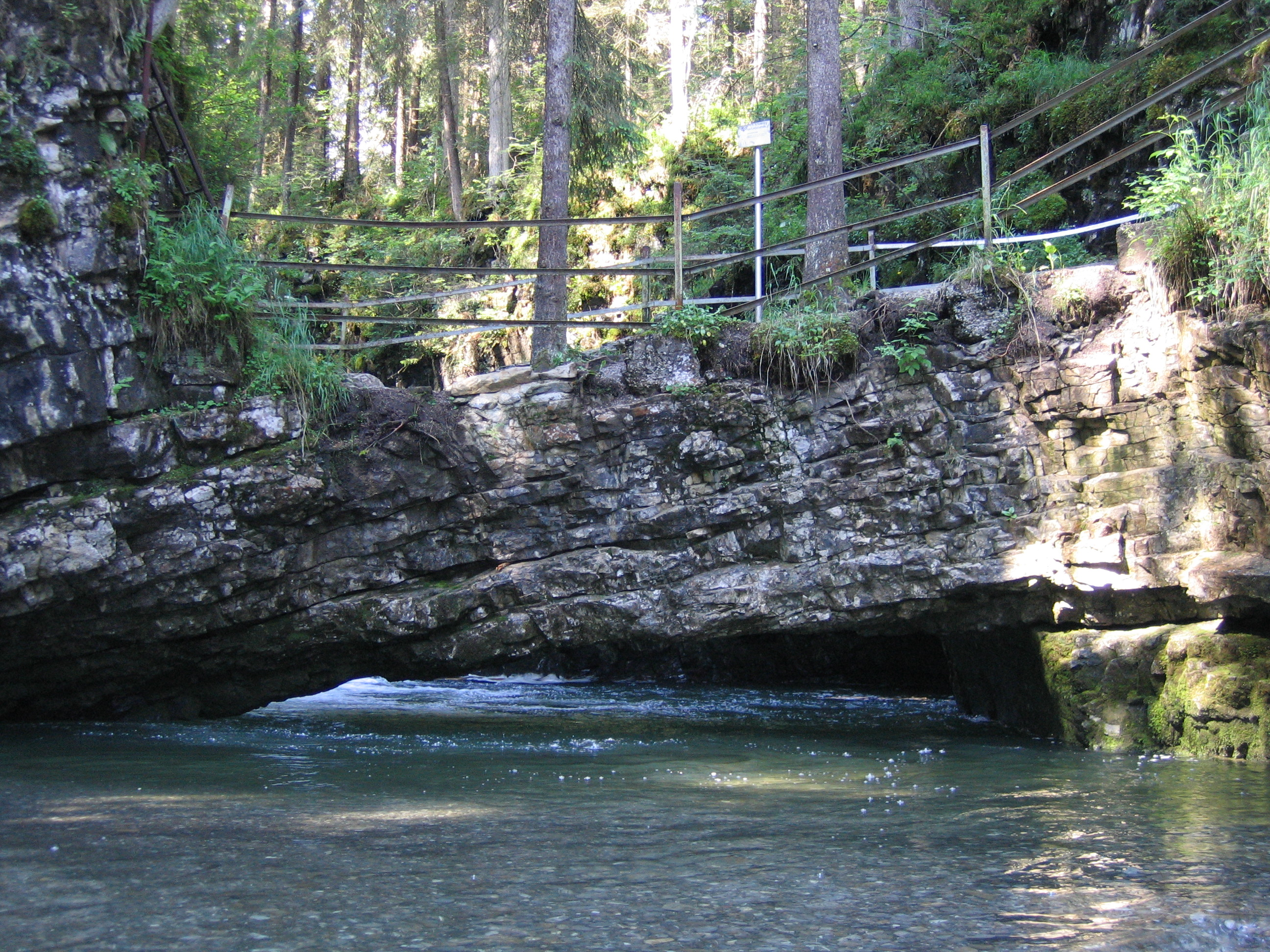 Naturbrücke am Schwarzwasserbach in Österreich, Vorarlberg in der Nähe von Oberstdorf